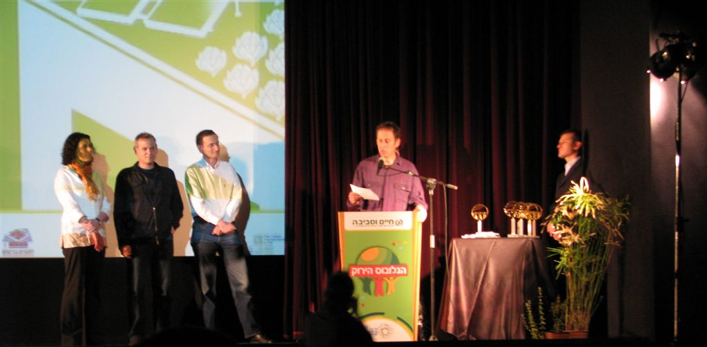 טקס הענקת פרס הגלובוס הירוק למטה המאבק להצלת עמק ססגון. הפרס ניתן על ידי חיים וסביבה" - ארגון הגג של ארגוני הסביבה בישראל, הכולל כ-130 ארגונים